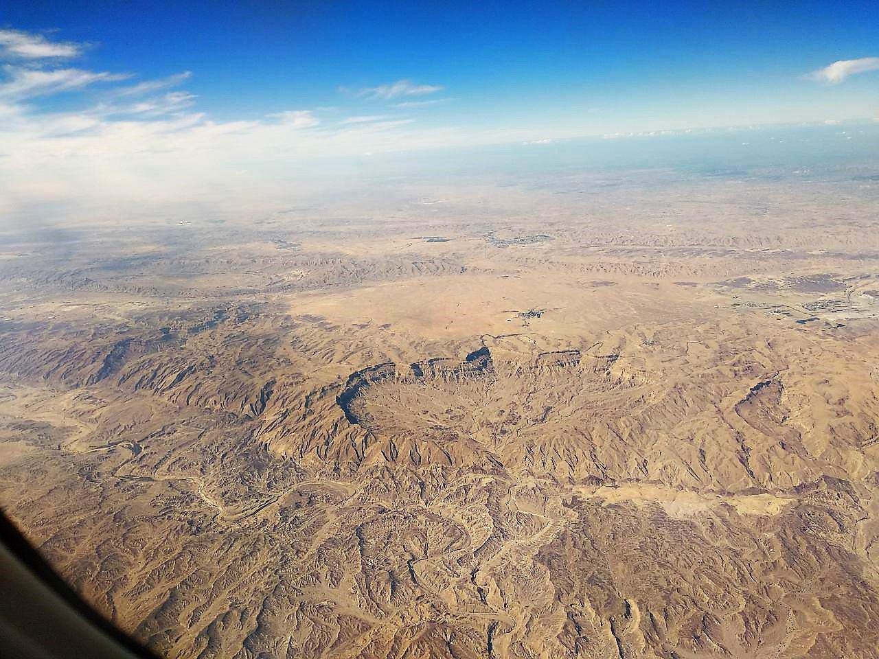 צילום אוויר של המכתש הקטן במהלך טיסה לאילת